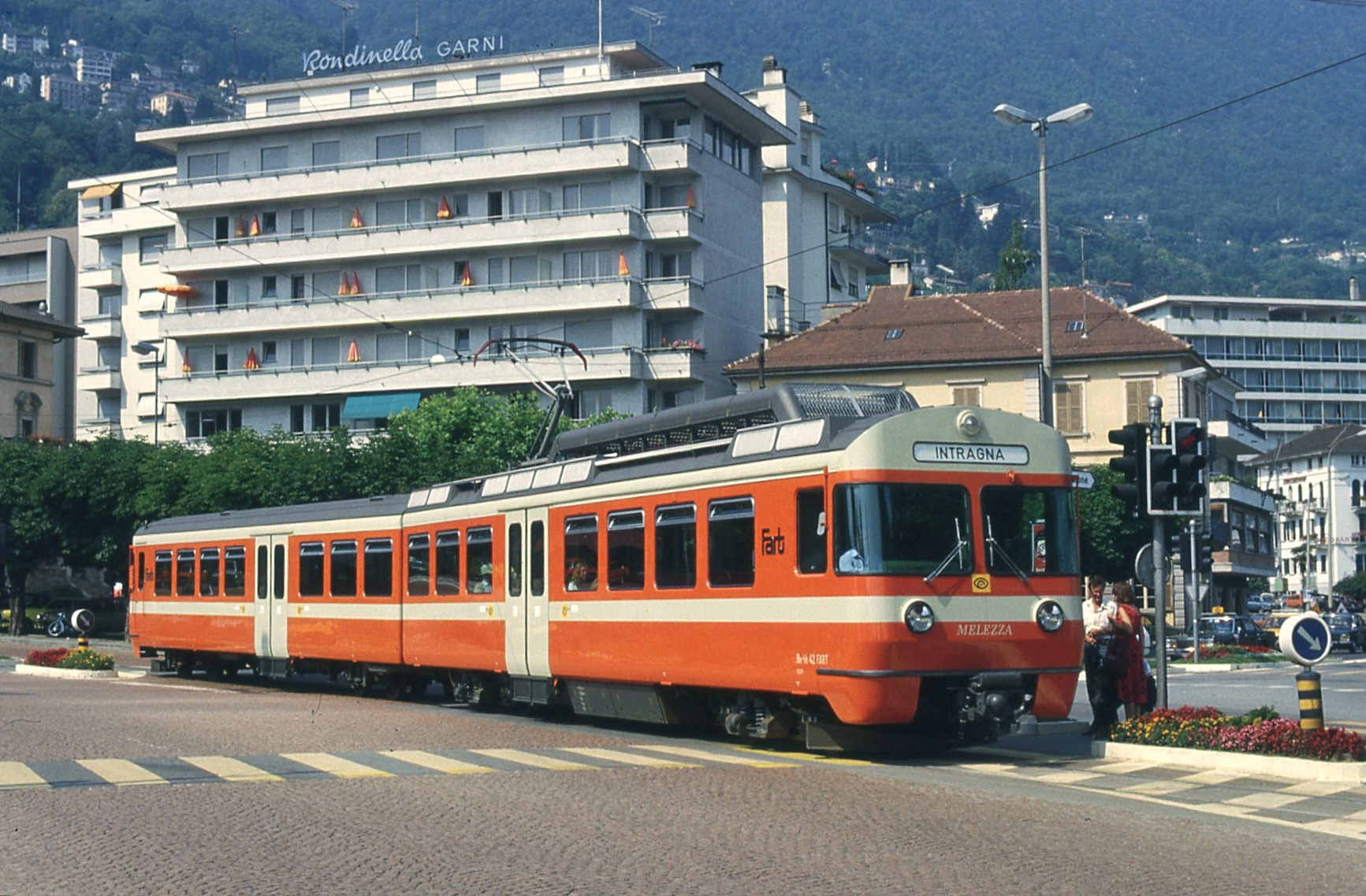 Elettrotreno della ferrovia delle Centovalli percorre la tratta urbana di Locarno, in viale Francesco Balli